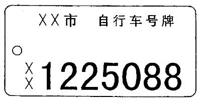 号码比对式自行车号牌式样，活动号码牌式样